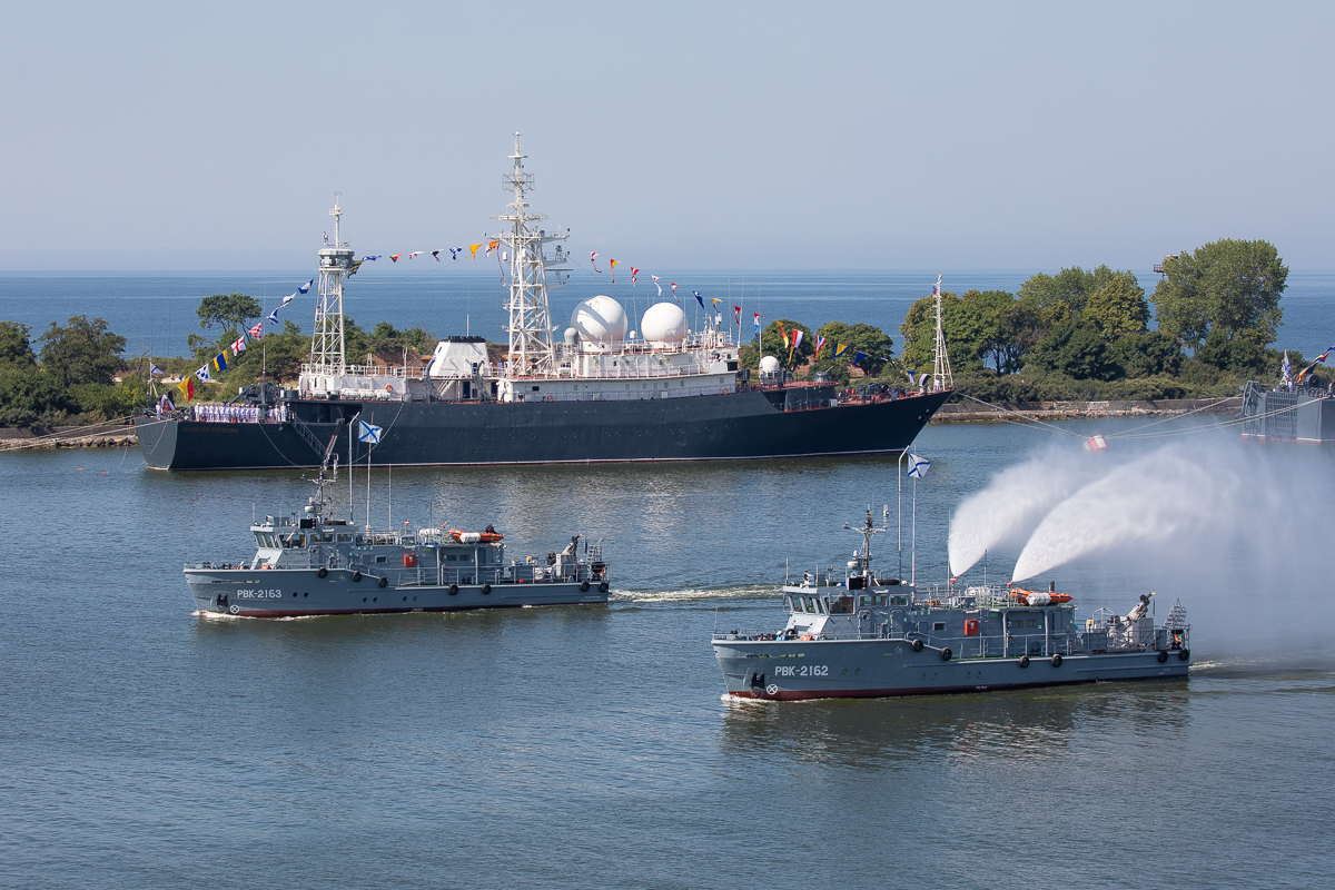 Рейдовый водолазный катер — спасательный многофункциональный катер (РВК — СМК). Празднование Дня ВМФ на Балтийском флоте (г. Балтийск, Калининградская область).